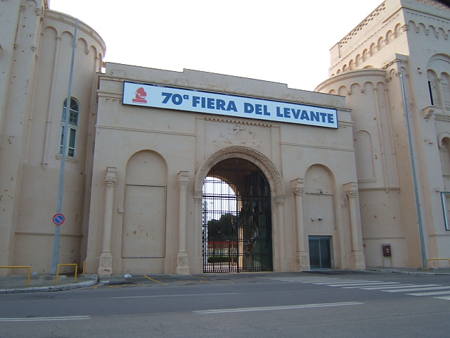 Bari: Ingresso della Fiera del Levante su Piazzale Vittorio Emanuele III.